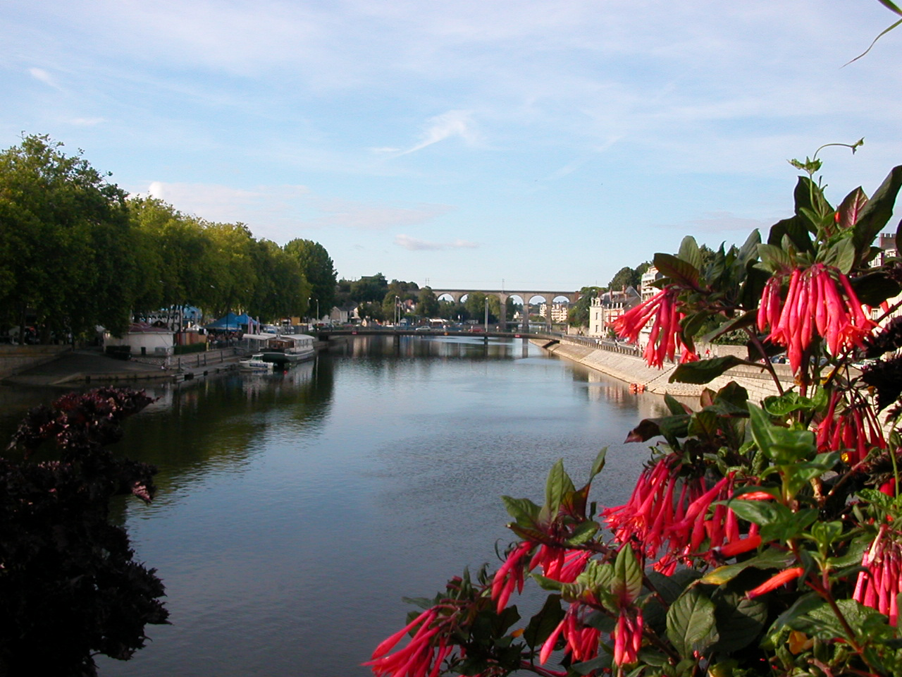 La Mayenne et le viaduc ferroviaire de Laval (Mayenne)